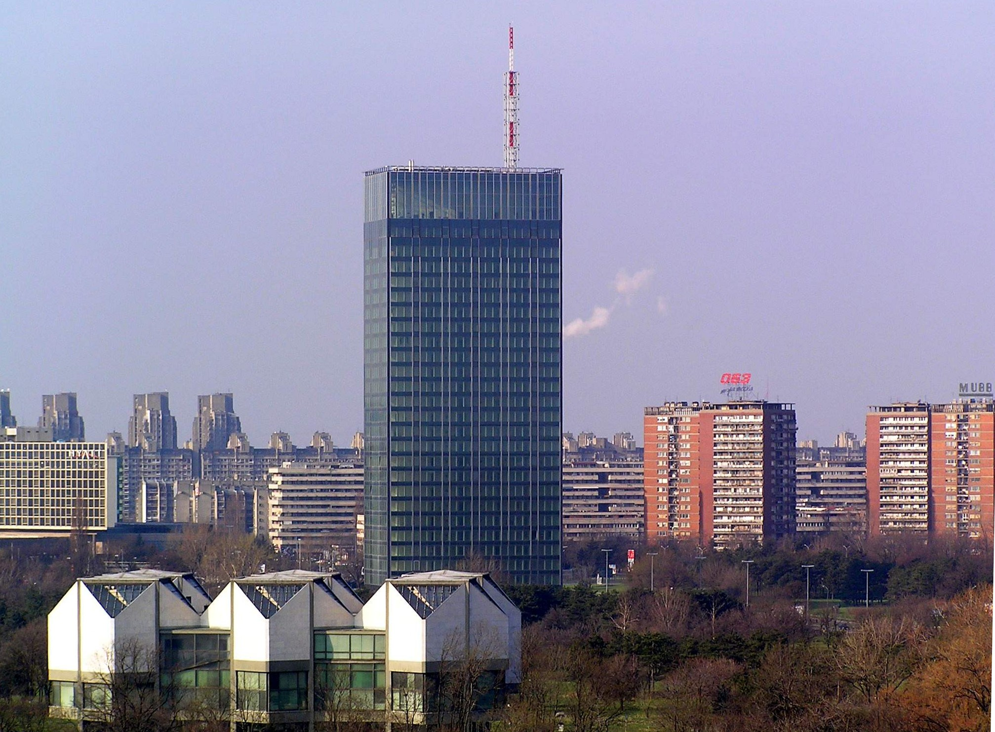 Ušće tower, Belgrade